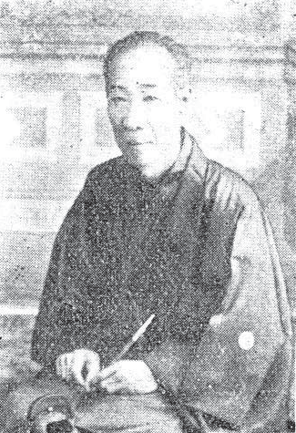 三好応岸の肖像写真 『宇和島吉田両藩誌』所載